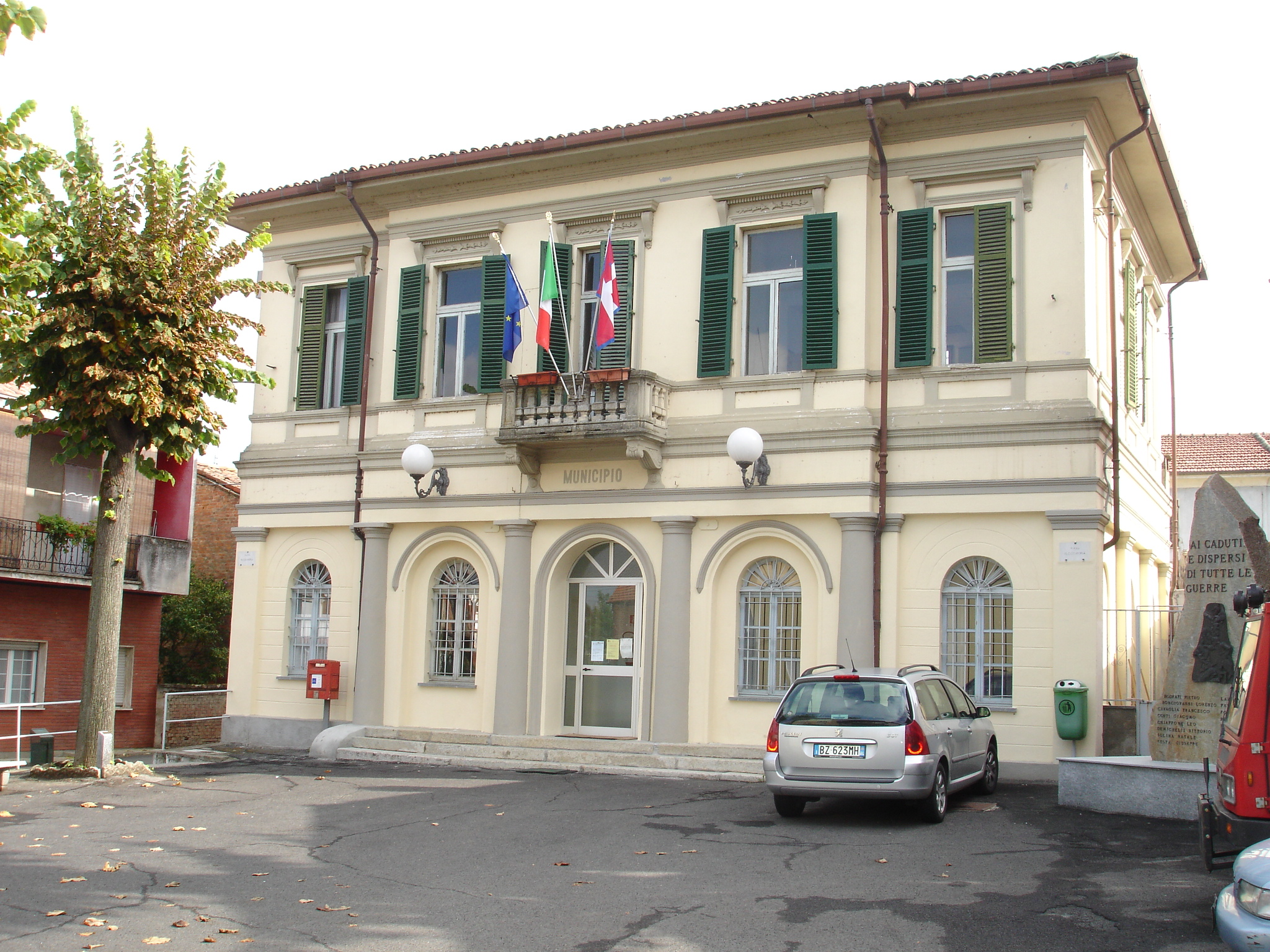 Autore: Tony Frisina